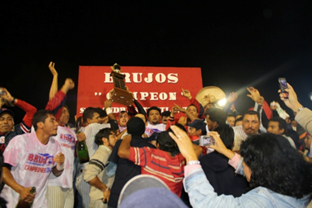 Equipo Brujos de los Tuxtlas campeon de la liga Invernal de Beisbol 2008